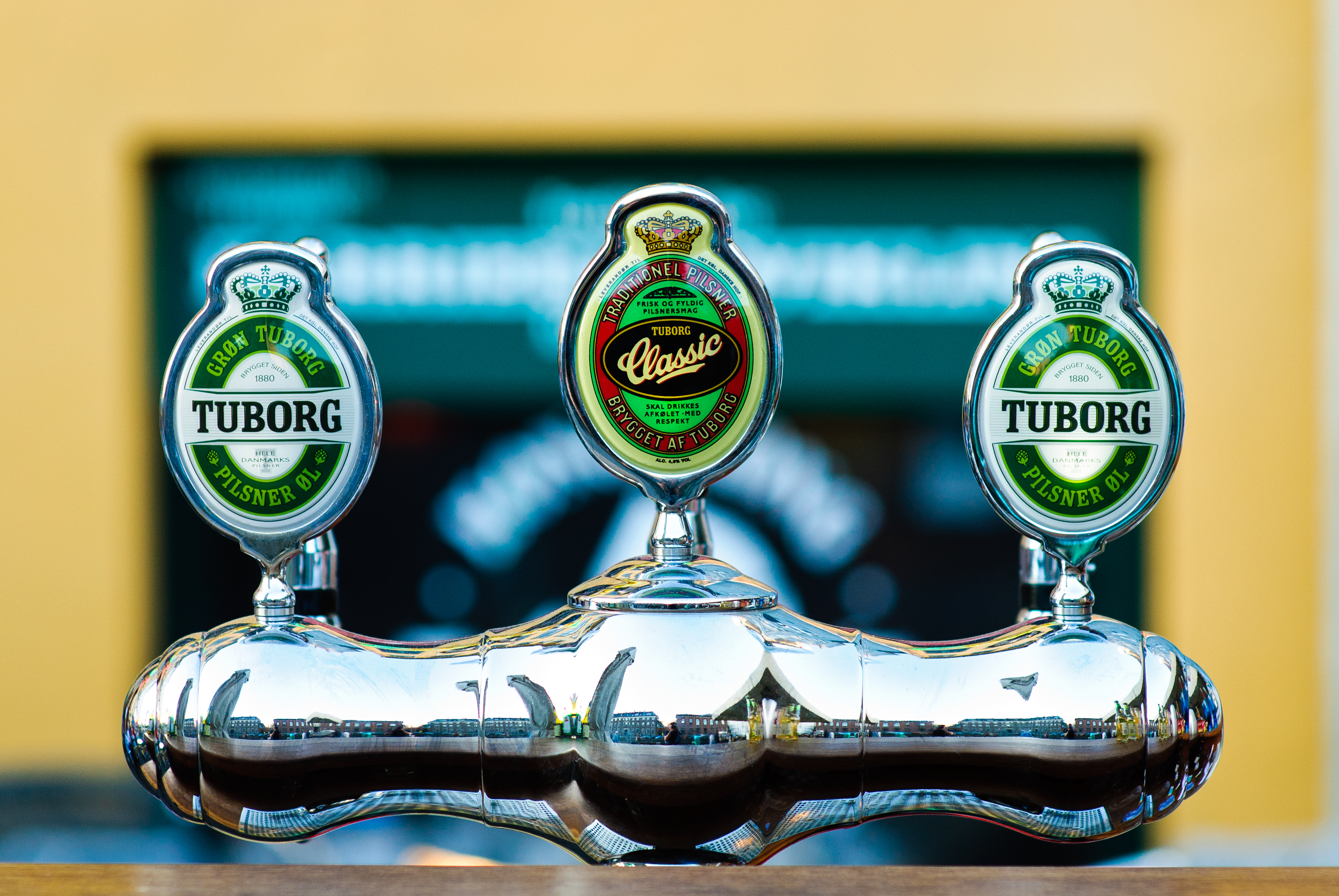 Tuborg beer taps in Kopenhagen